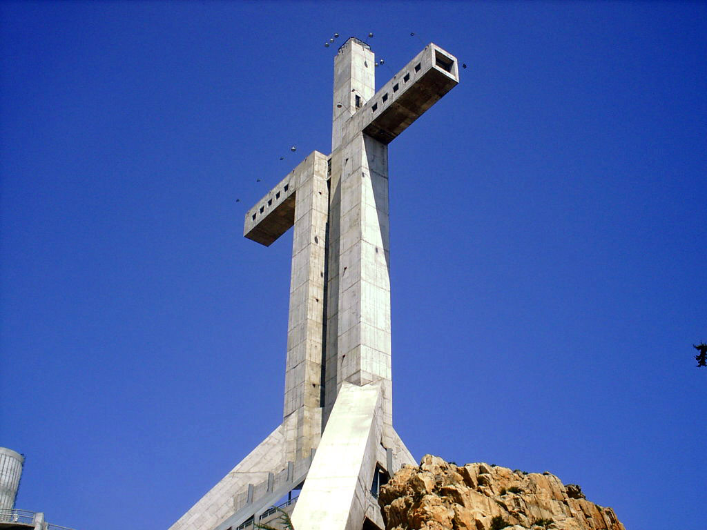 Cruz del tercer milenio, ubicada en la ciudad de Coquimbo en la region del mismo nombre en Chile. foto de autoria propia, tomada en septiembre del 2005.